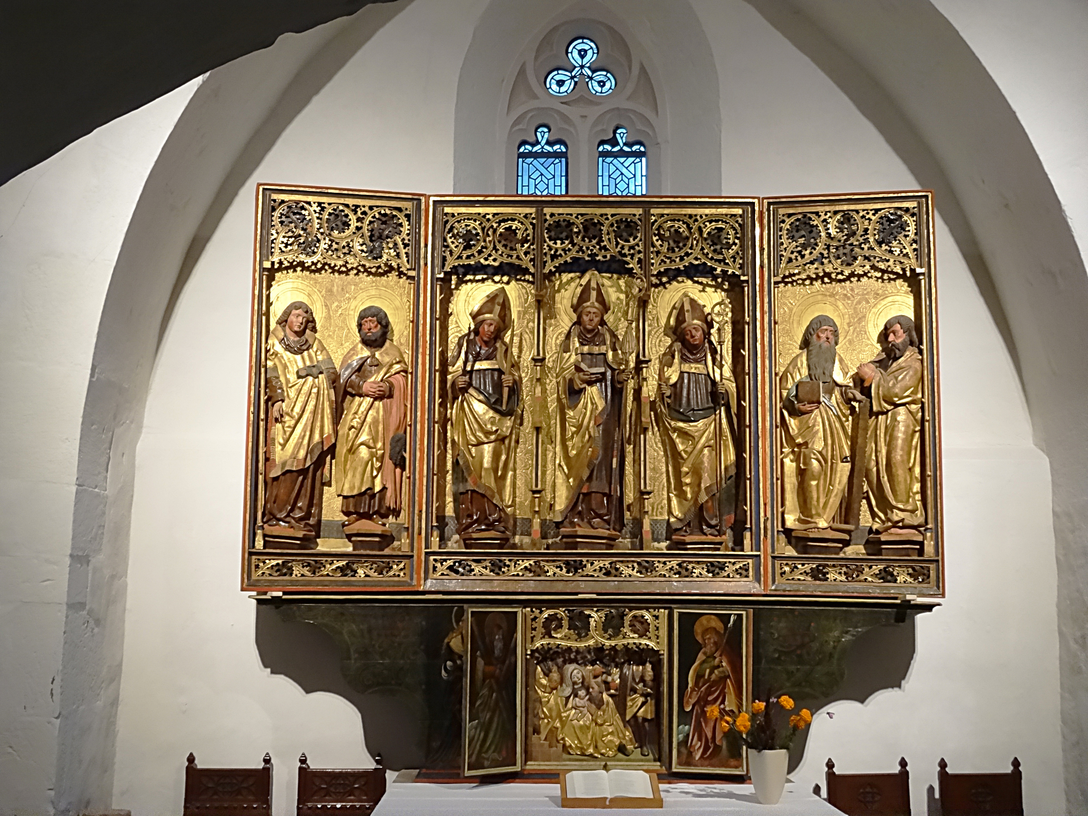 der gotische Schnitzaltar in der Turmkapelle der Petri-Pauli-Kirche (Eisleben) stammt aus der stillgelegten Eislebener Nicolai-Kirche